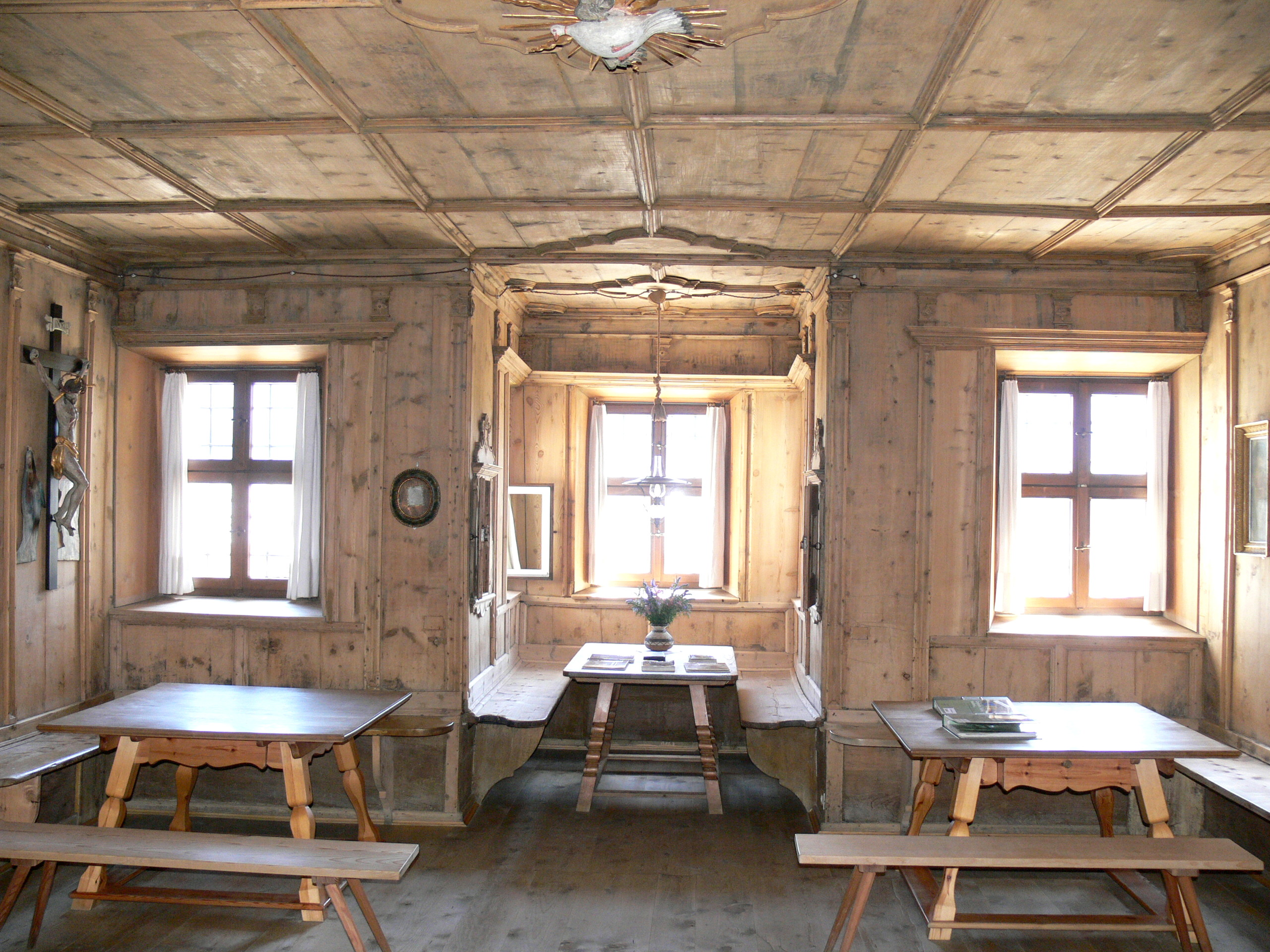 Volkskundemuseum Dietenheim in Südtirol. Ansitz Mair am Hof: Wohnstube ( 17.Jhdt. )